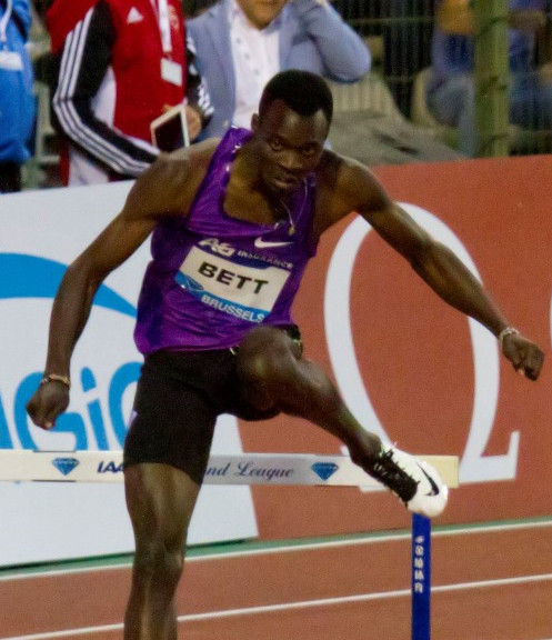 Nicholas Bett during during 2015 Memorial Van Damme, Brussels.